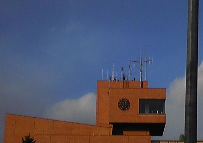 FM中標津放送送信所画像